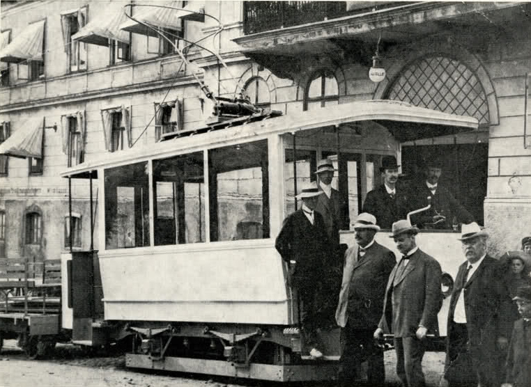 Spårvagnen i Ulricehamn 1911 utanför stadens stadshotell.